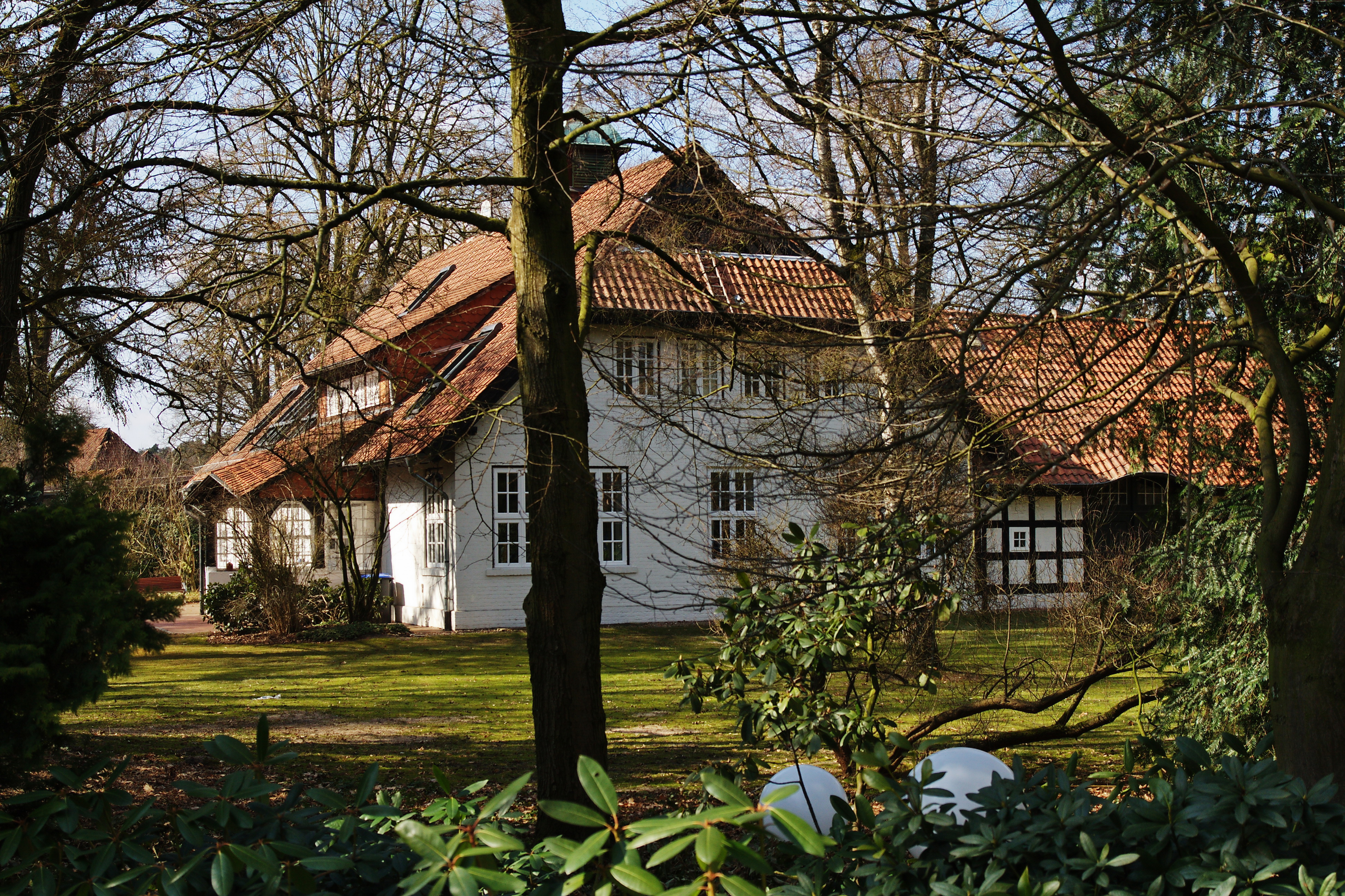 Alte Schule in Bannetze (Winsen)), Niedersachsen, Deutschland, ein Werk des Architekten Otto Haesler von 1911.